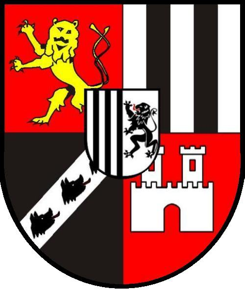 Wappen Kirchberg Sayn-Hachenburg (Sayn - Wittgenstein - Freusberg - Homburg mit Herzschild Kirchberg